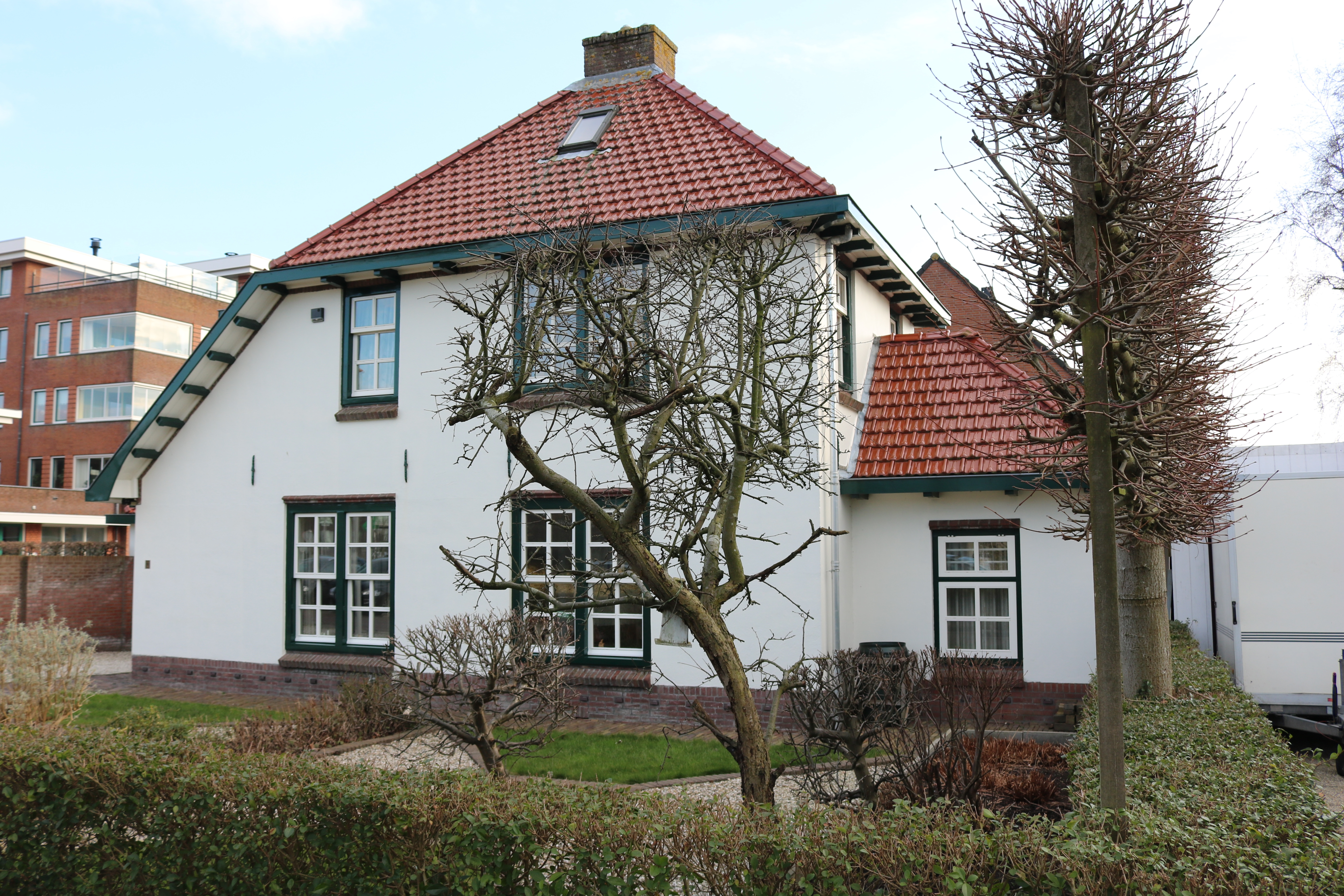 Wachterswoning bij voormalig station Roelofarendsveen (foto: Daniel van der Ree)